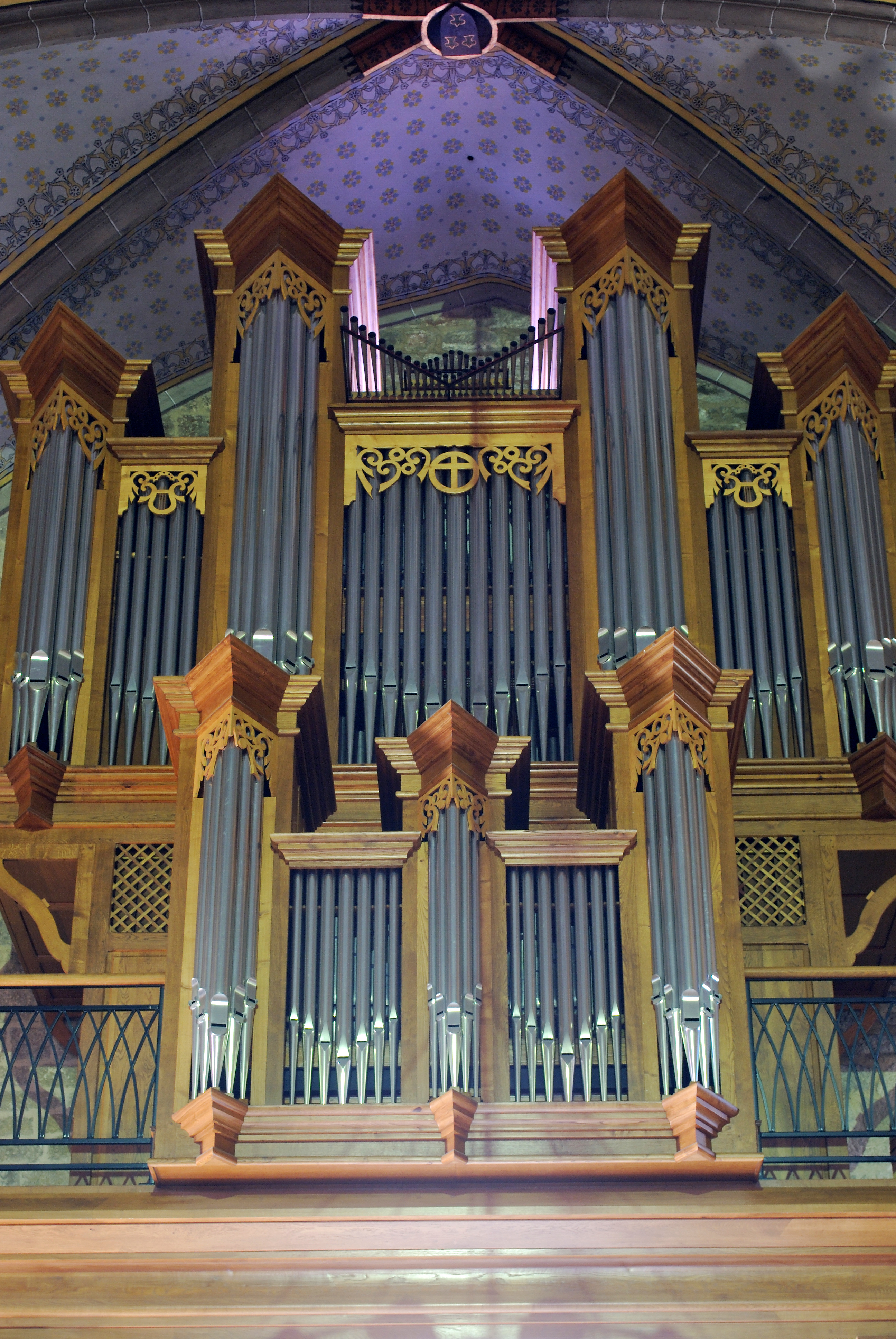 Laroque-d'Olmes, Ariège - Orgue de l'église du Saint-Sacrement